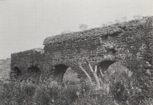 L'Acquedotto romano, che riforniva la città di Catania dalla città di Inessa, odierna Santa Maria di Licodia. Esso era alimentato da un serbatoio d'acqua, un tempo esistente nell'attuale Piazza Matteotti.